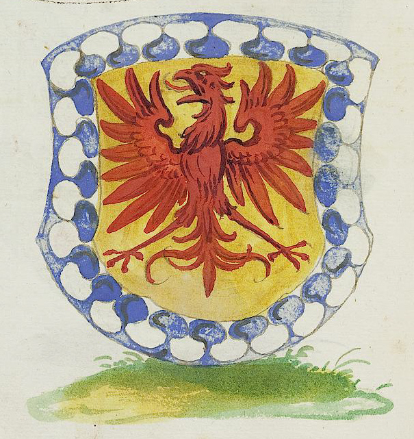 Wappen aus: David Wolleber: Chorographia Württemberg, [Schorndorf] 1591, Universitätsbibliothek Tübingen, Mh 6,1 Wappen der Grafen von Fürstenberg und der Grafen von Freiburg